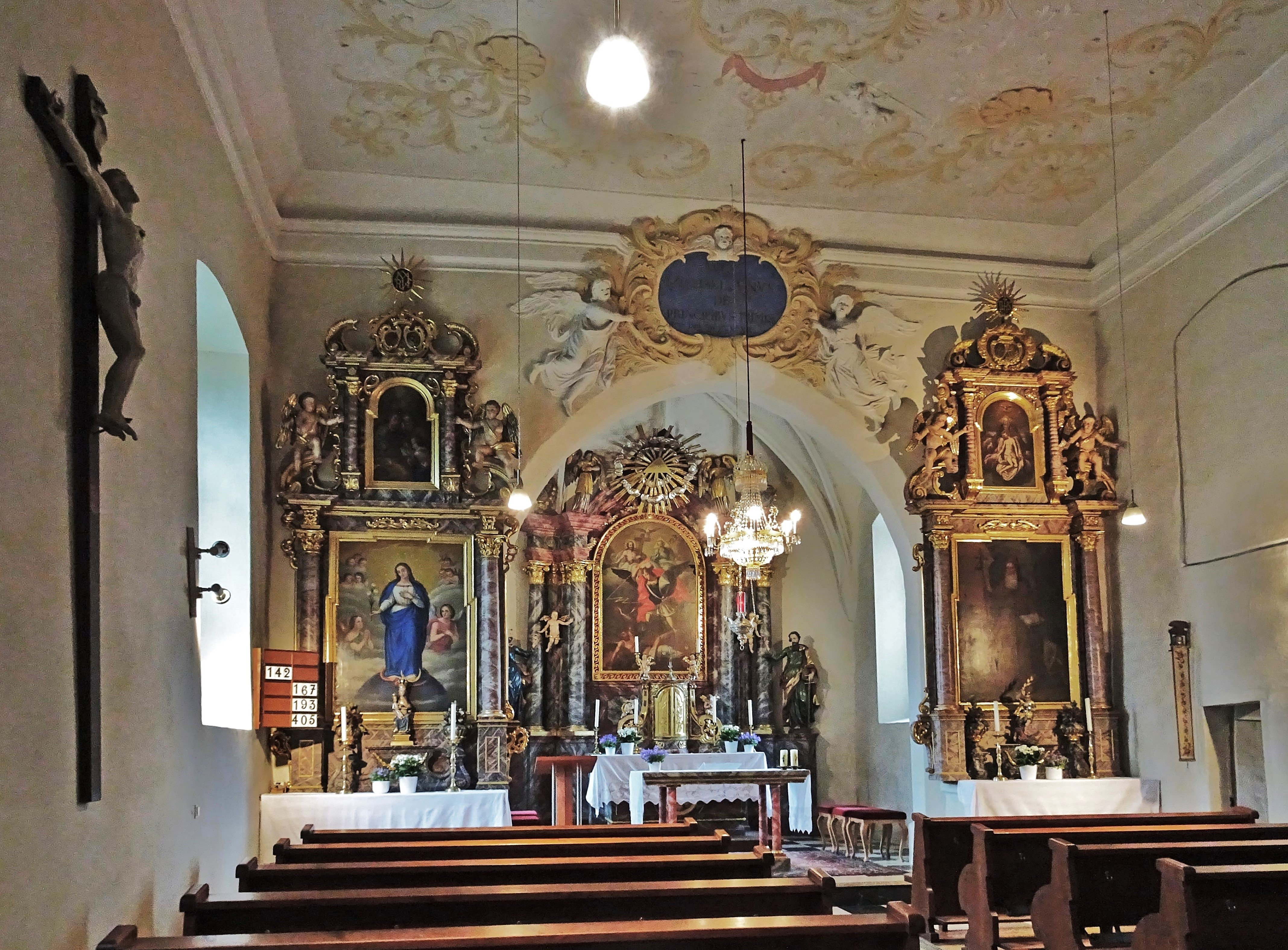 Kath. Pfarrkirche St. Michael am Zollfeld, Innenansicht